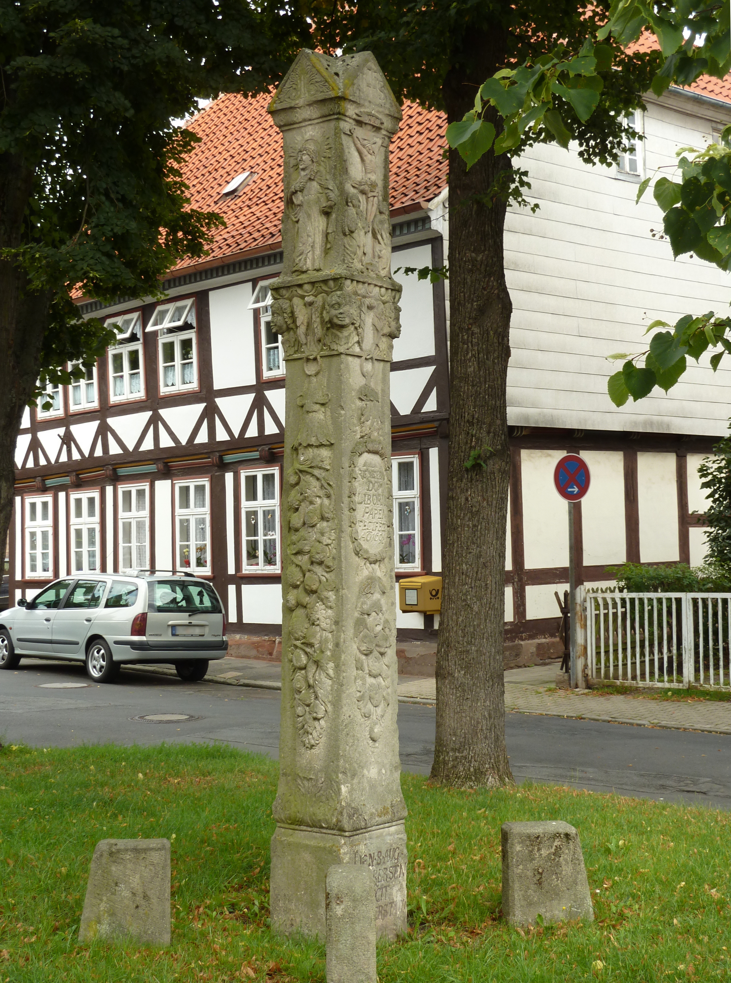 Bildstock "Heiligenpfosten" auf dem Stiftsplatz in Nörten-Hardenberg, erstellt 1698 durch den Bildhauer Andreas Georg Kersten aus Duderstadt (1646-1720). Etwa 3,70 m hoch aus Sandstein